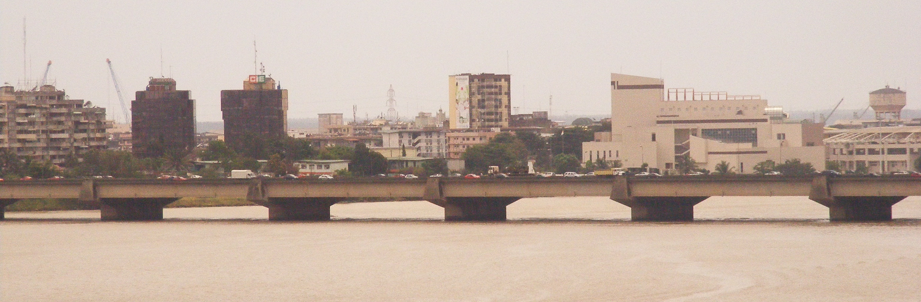 Pont de Gaulle et Treichville, Abidjan